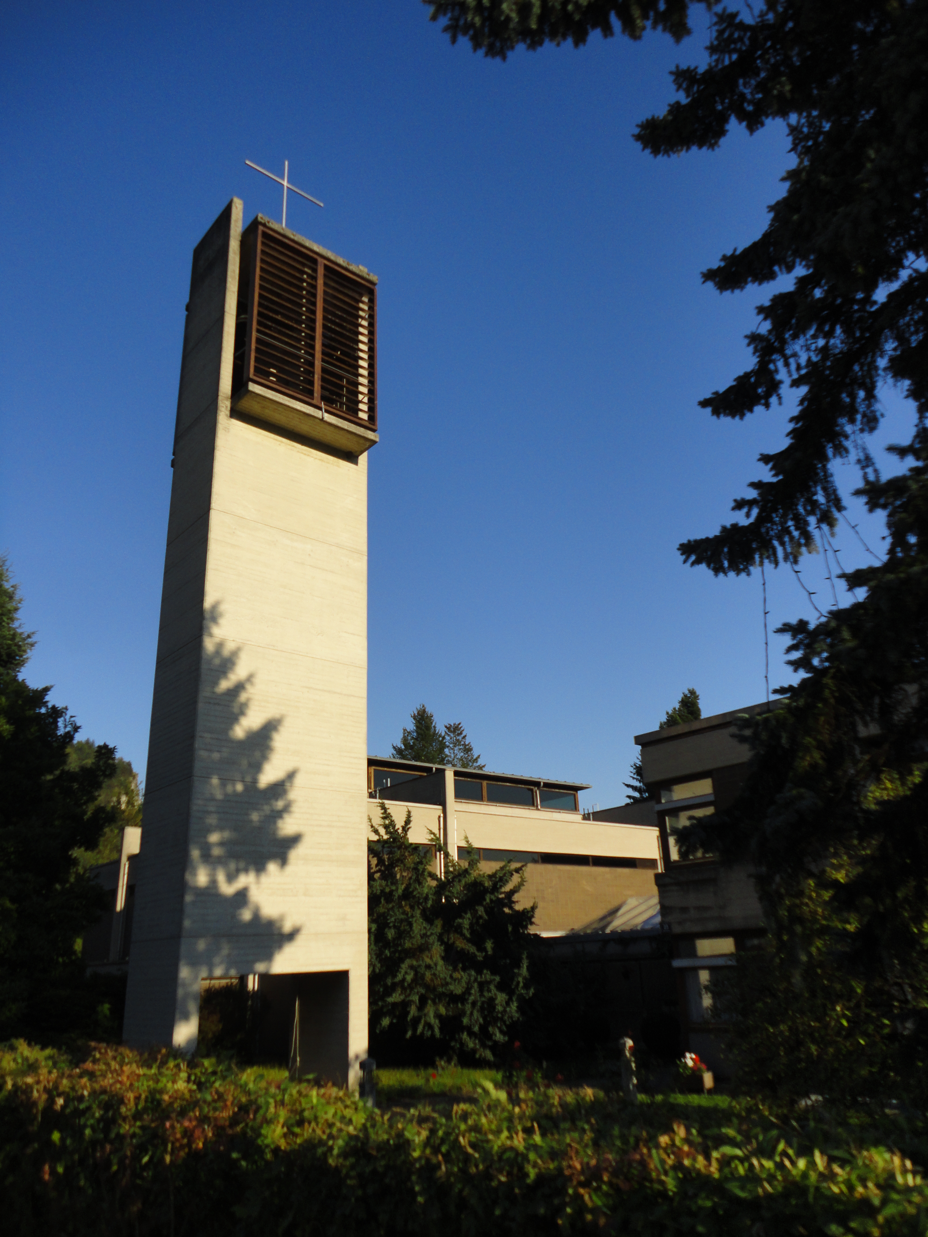 Kath. Pfarrkirche hl. Schutzengel und Pfarrhof